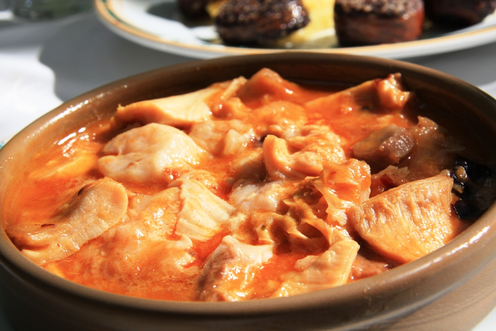 Ver artículo en mi Blog en Enlace See post in My blog at Link